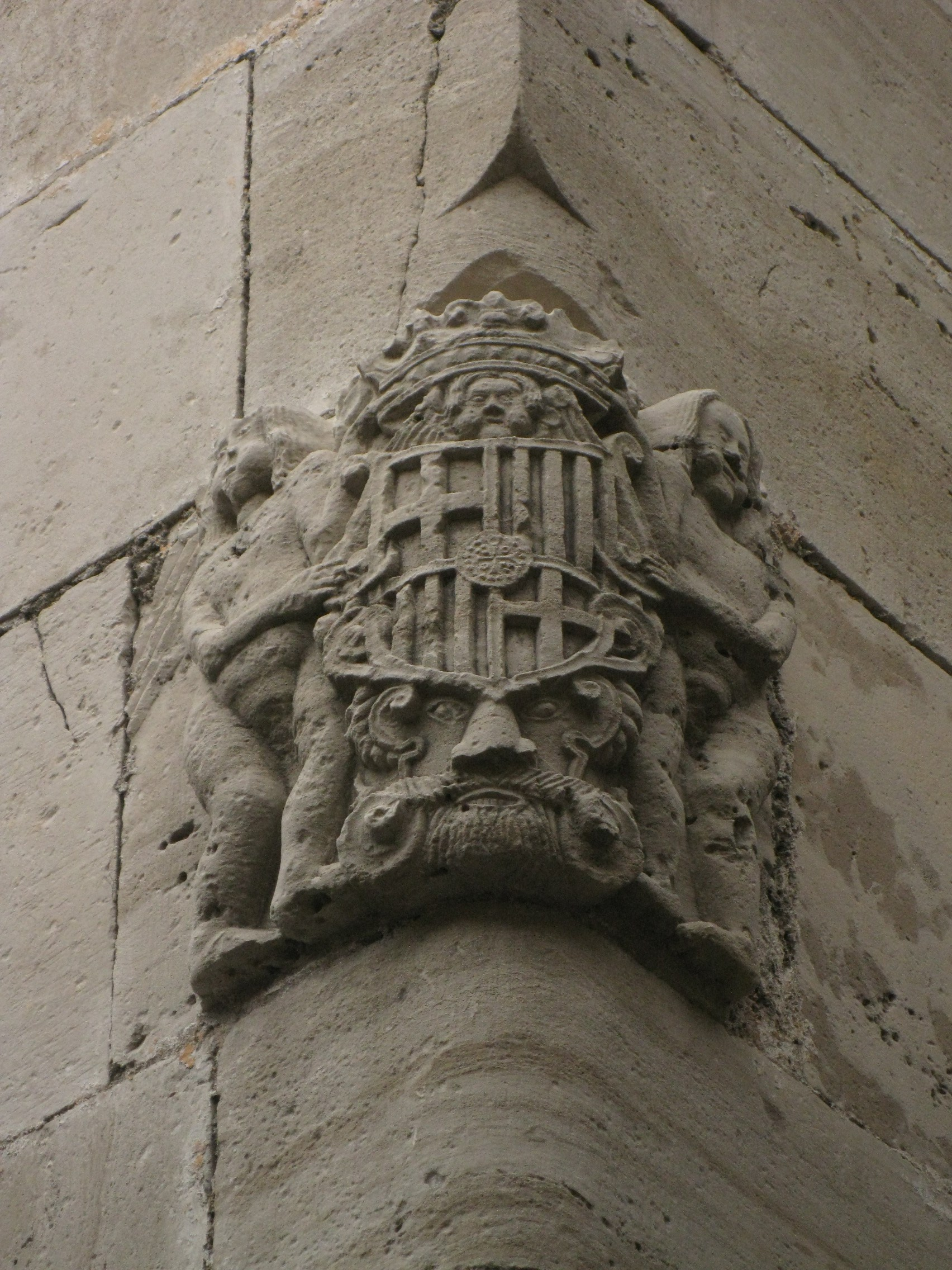 Escut de Moià en un cantó de l'església de Santa Maria, al carrer del Pont de Moià